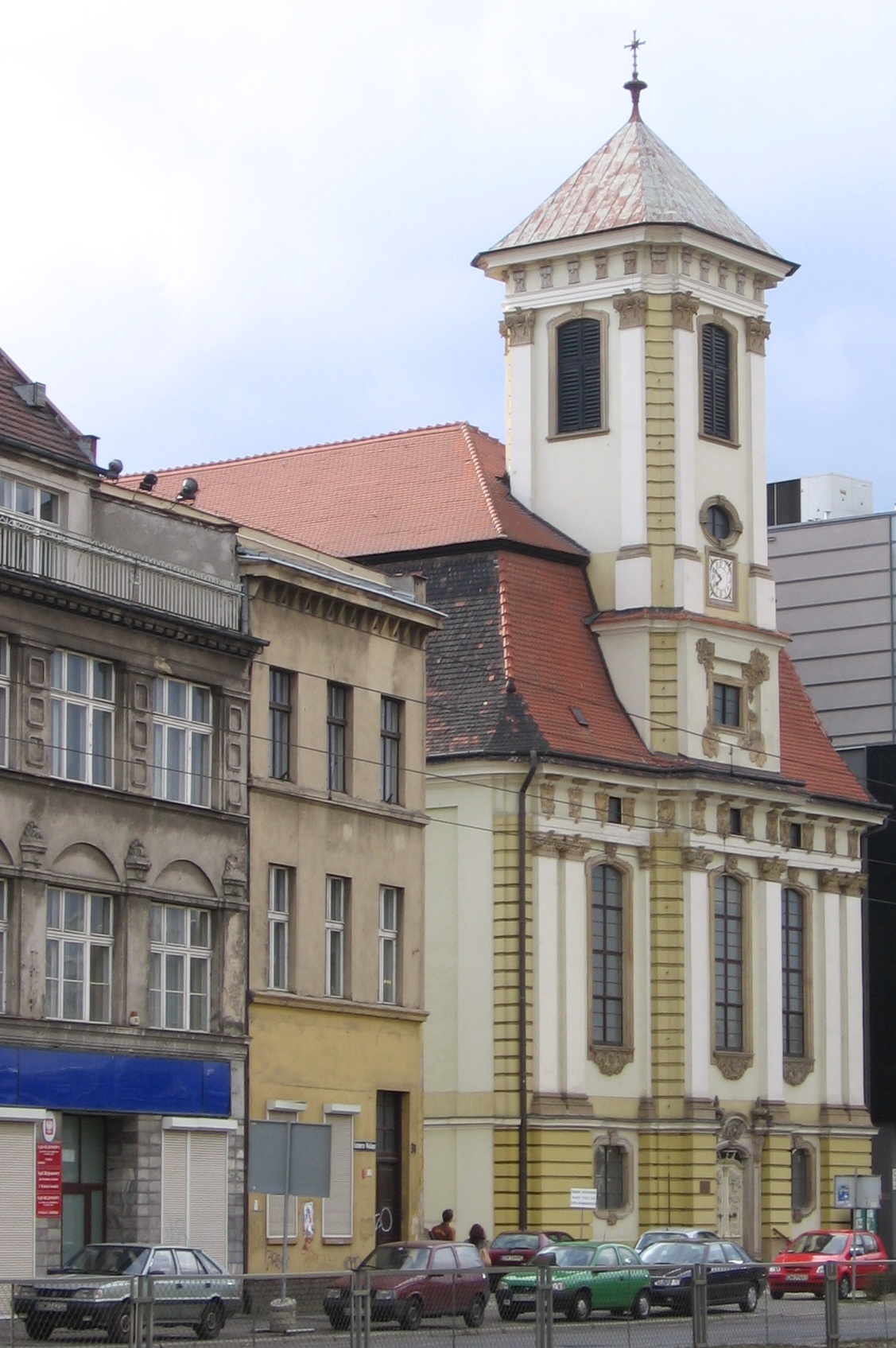 Wrocław, Poland - evangelic church of Holy Providence (known as "courtly church") Wrocław - kościół ewangelicki pw. Opatrzności Bożej (tzw. kościół dworski)